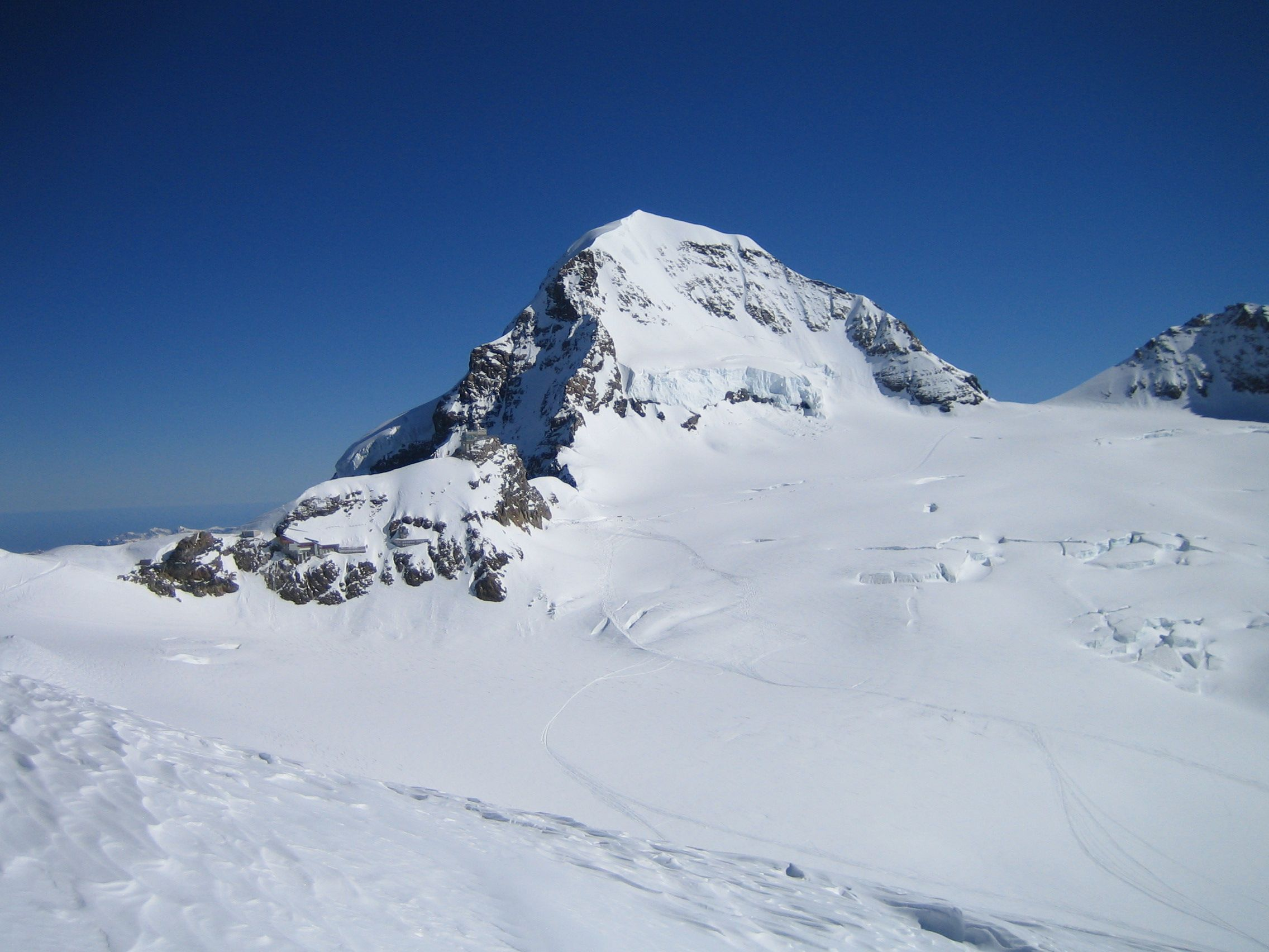 Mönch vom Gletscher aus